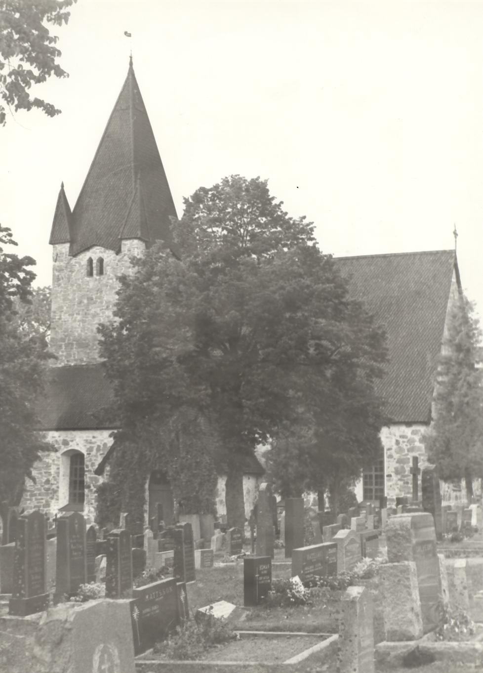 Finströms kyrka på Åland (1990), en bild tagen av Harri Blomberg.